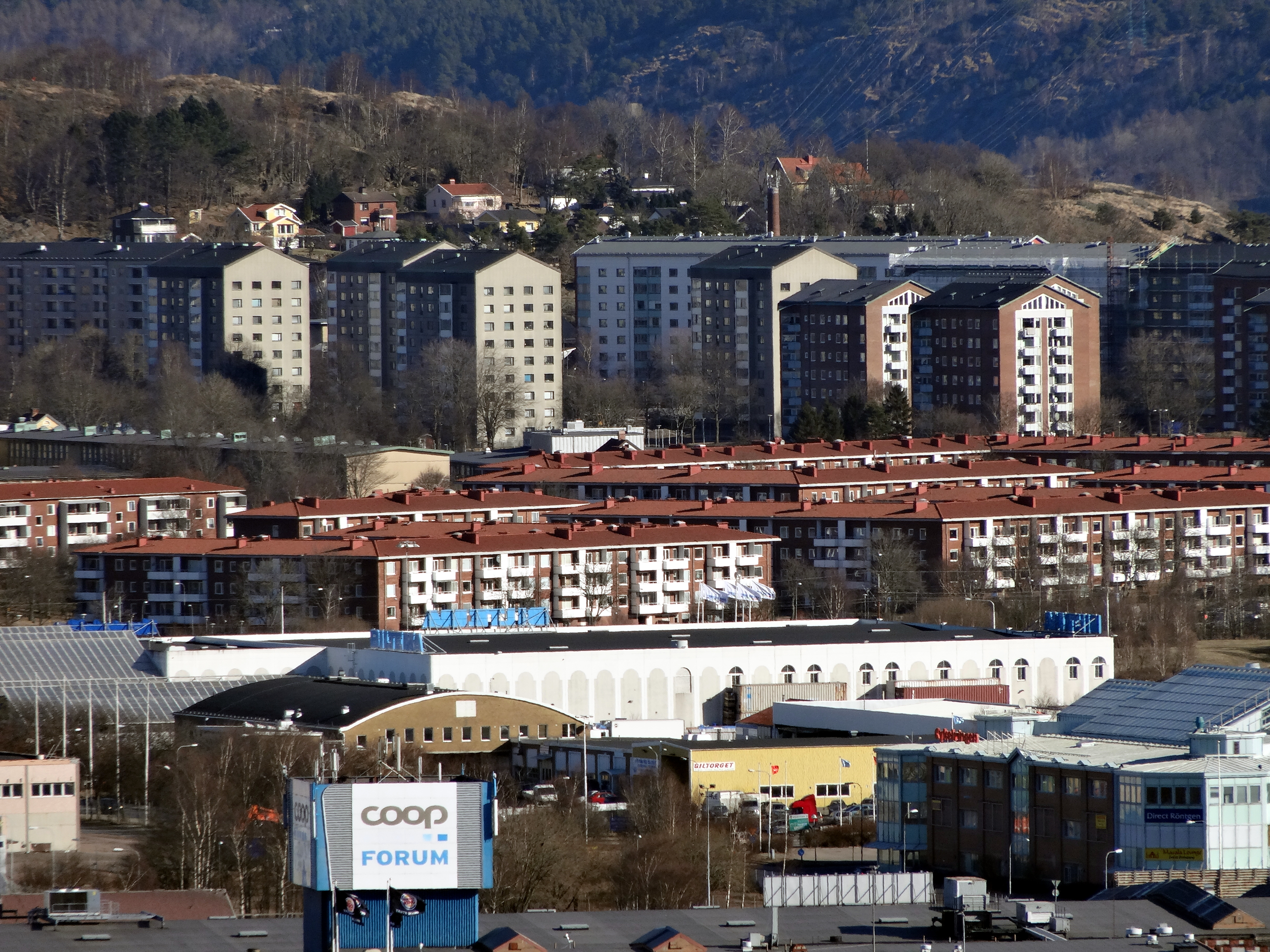 Bostadsbebyggelsen i Brunnsbo i Göteborg, mars 2013.